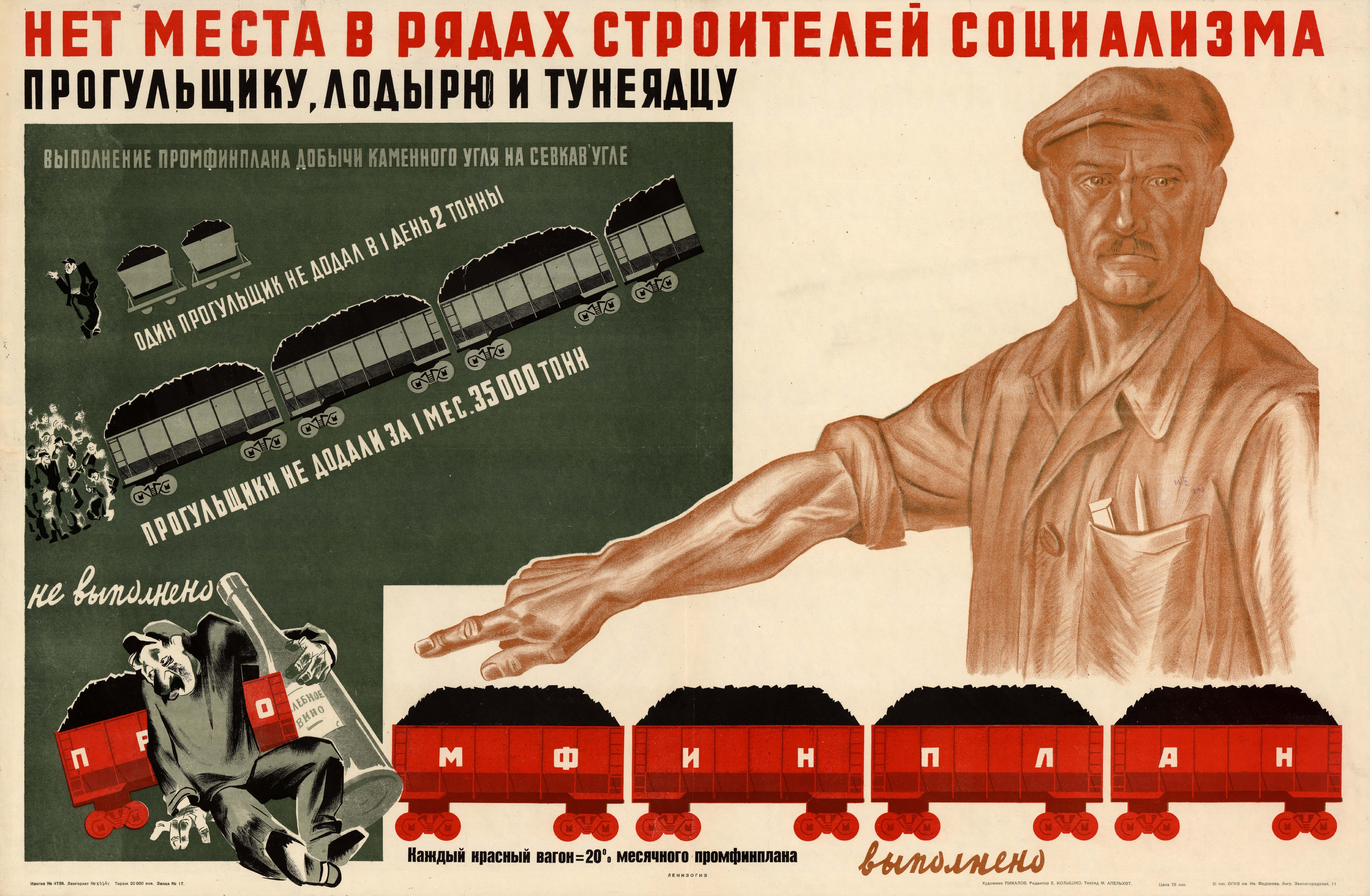 Нет места в рядах строителей социализма прогульщику, лодырю и тунеядцу : [плакат] / худож. [Г.] Пикалов ; ред. Е. Колышко ; техн. ред. М. Апельхот. — [Ленинград] : Ленизогиз, [1933] (Ленинград : 21-я типография ОГИЗ им. Ивана Фёдорова). — Цветная литография, 1 лист, 71 × 107 см. — 20 000 экз.